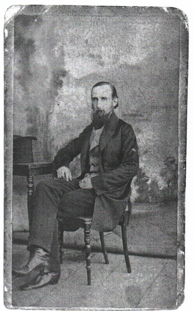 Дашков Андрей Дмитриевич